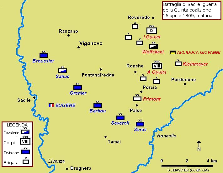 Mappa della Battaglia di Sacile del 1809